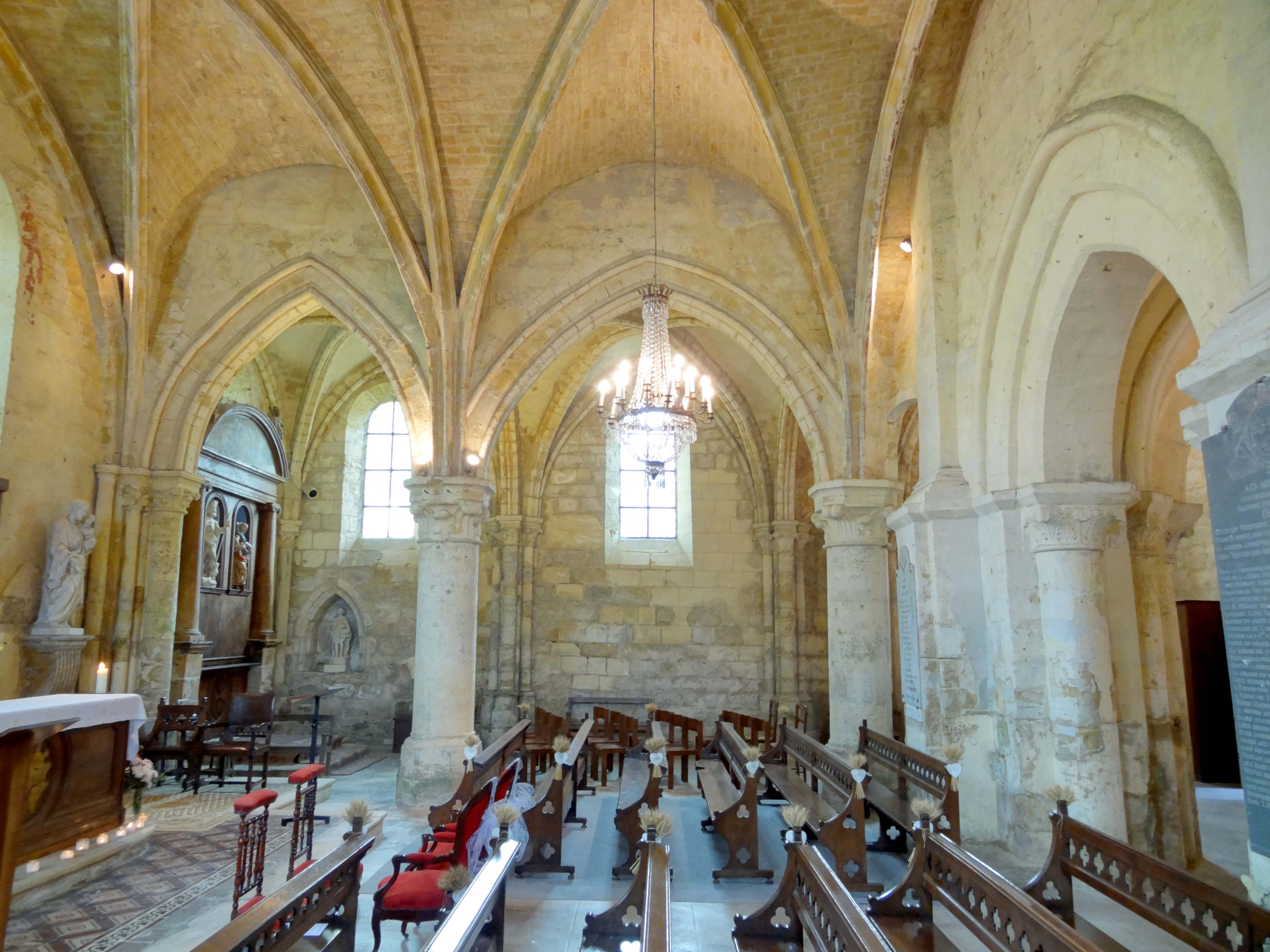 Intérieur de l'église - voir titre.